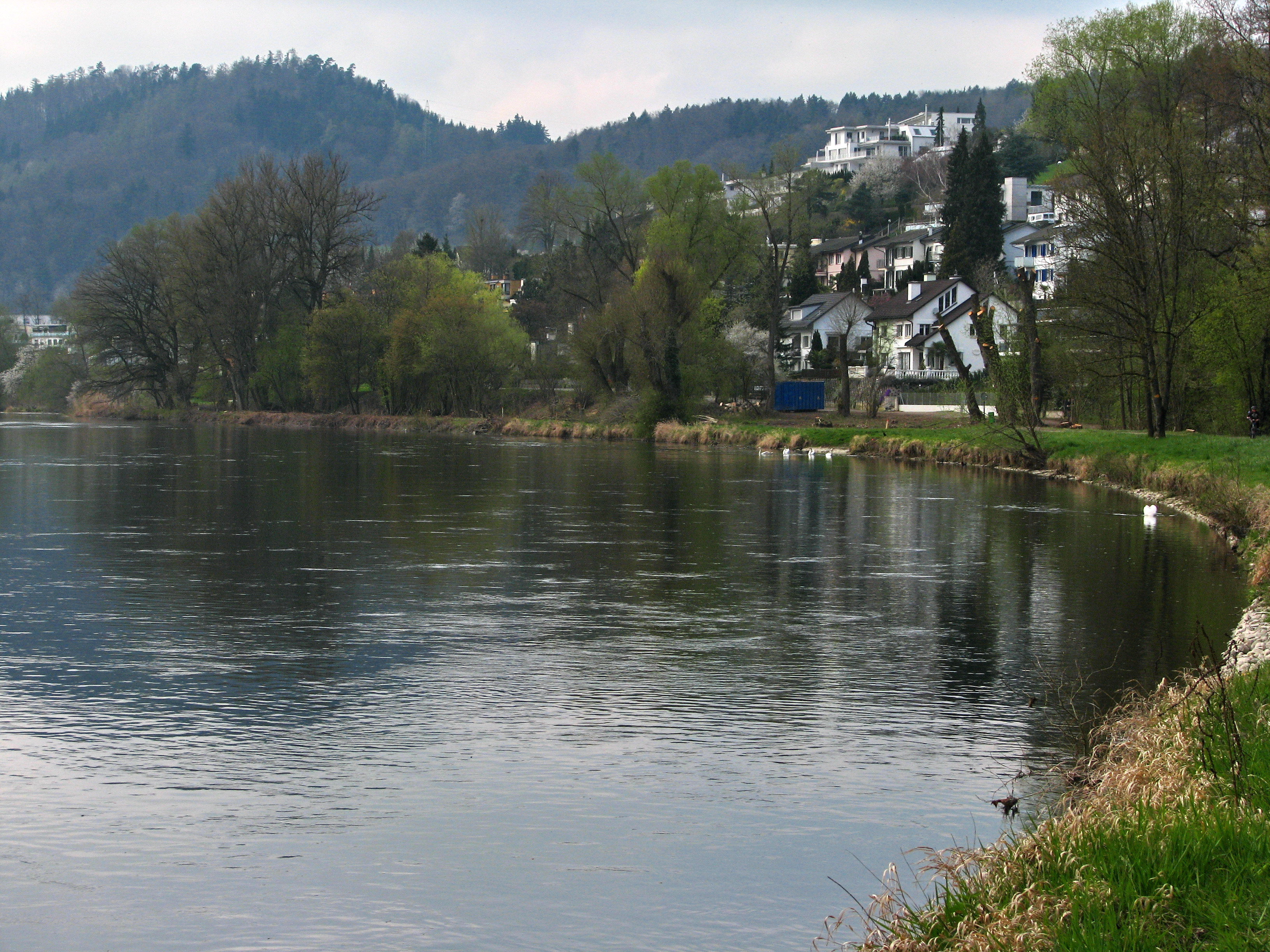 Limmat in Geroldswil